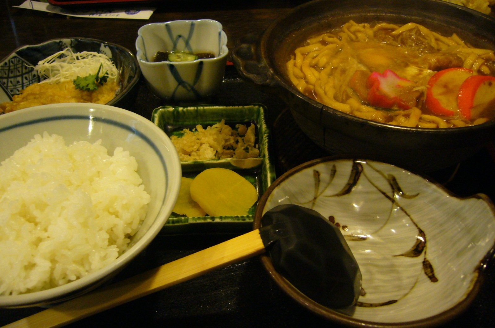 at Menhiro（めんひろ）